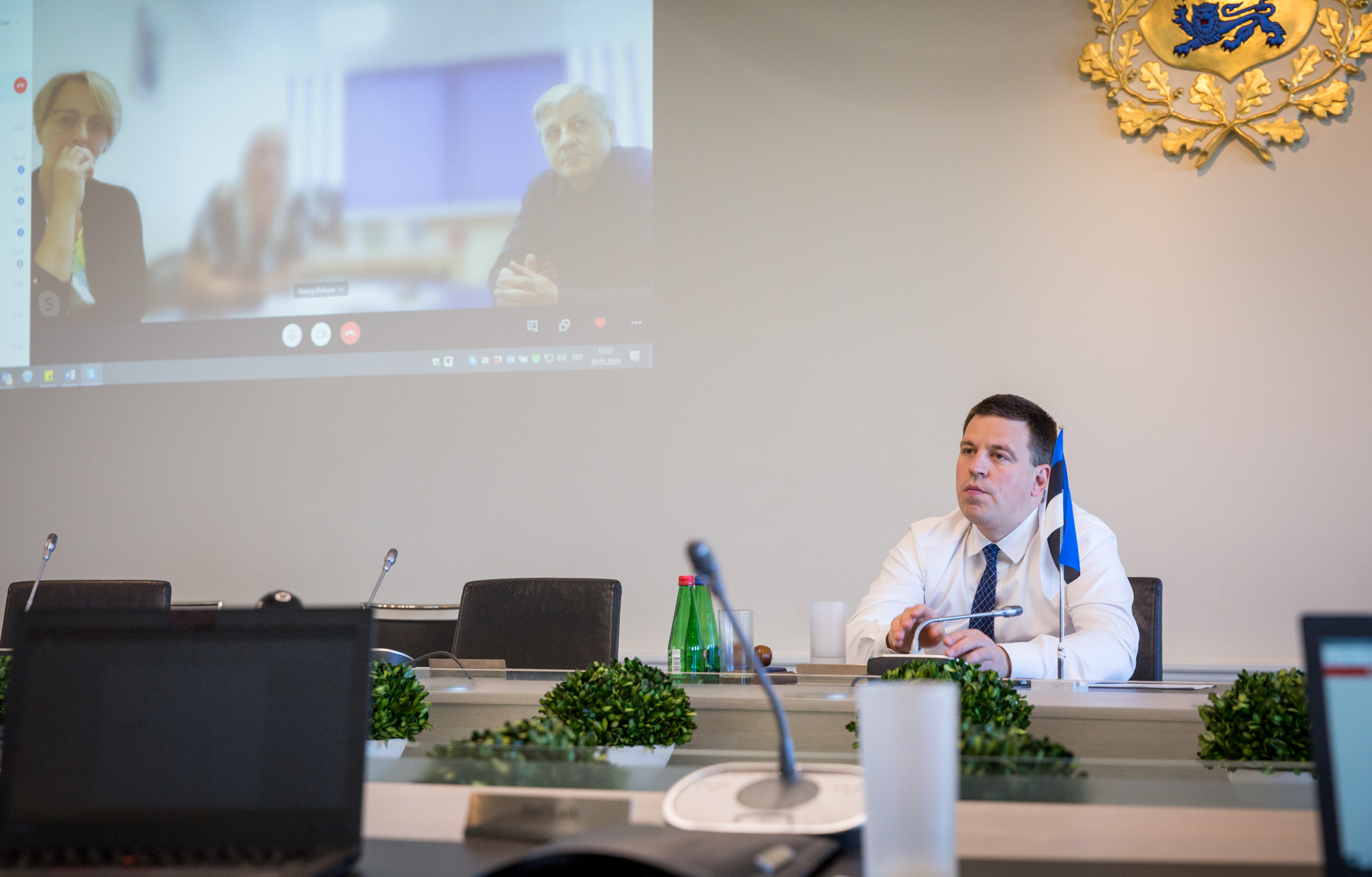 Jüri Ratase videokõne KOVidega koroonapandeemia ajal 2020. aasta kevadel.